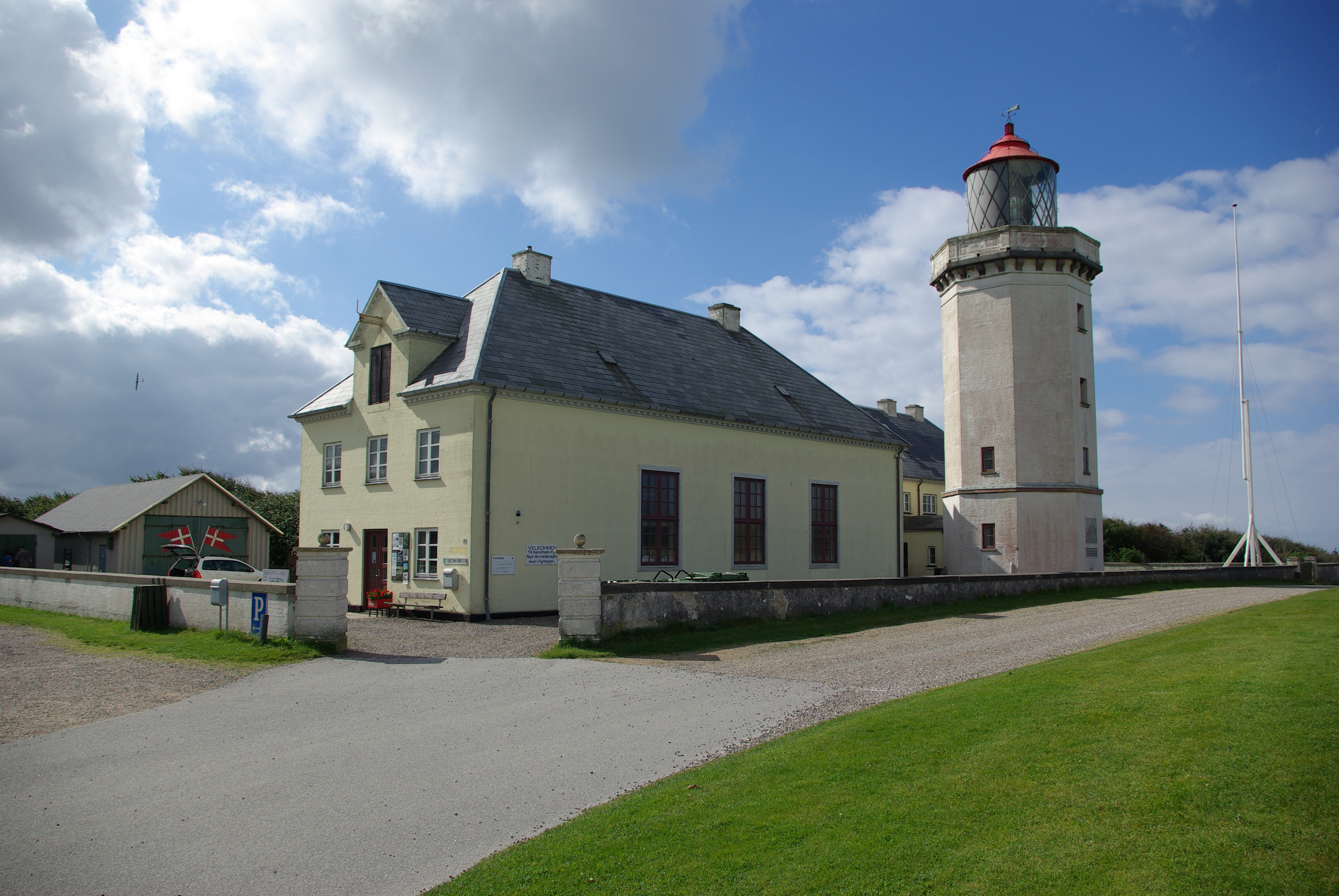 Hanstholm Fyrtårn